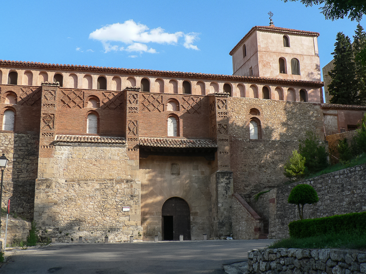 25072006 180112 ALB 0708